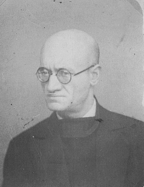 Alexander Sascha Schapiro (1889/1890-1942) est un anarchiste ukrainien, père du mathématicien Alexandre Grothendieck.